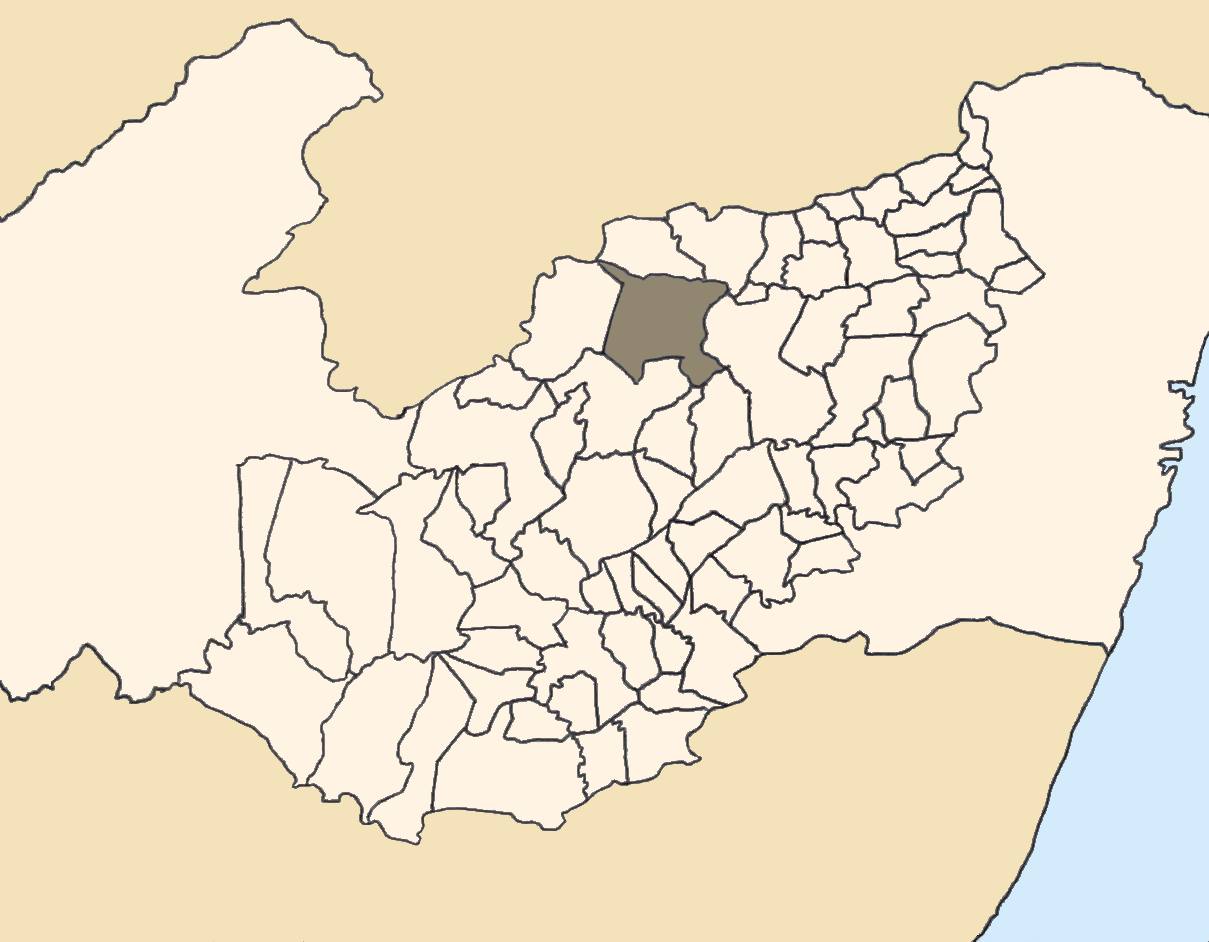 Mapa da mesorregião Agreste de Pernambuco (Brasil) subdivida em municípios. Em destaque, o município de Brejo da Madre de Deus. Map of the brazilian state of Pernambuco (mesorregião Agreste) showing the city of Brejo da Madre de Deus. Imagem tratada com o GIMP. Image made with GIMP.